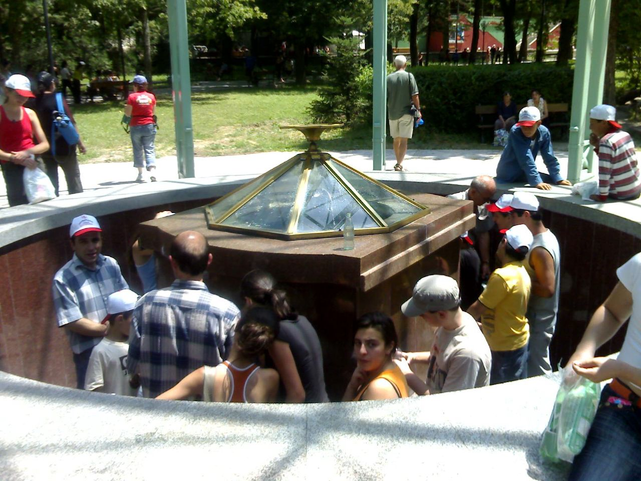 Borjomi